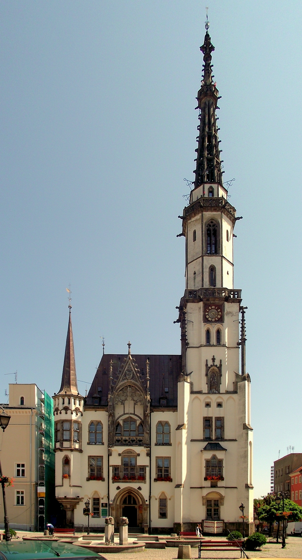 Ratusz w Ząbkowicach Śląskich (1862-64 r.).